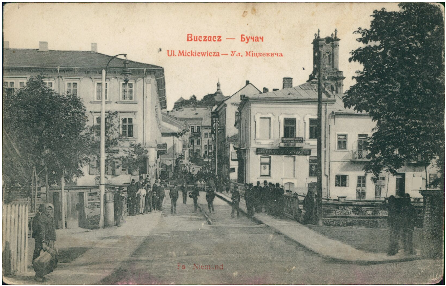 Бучач до руйнації московитами у І-у світову